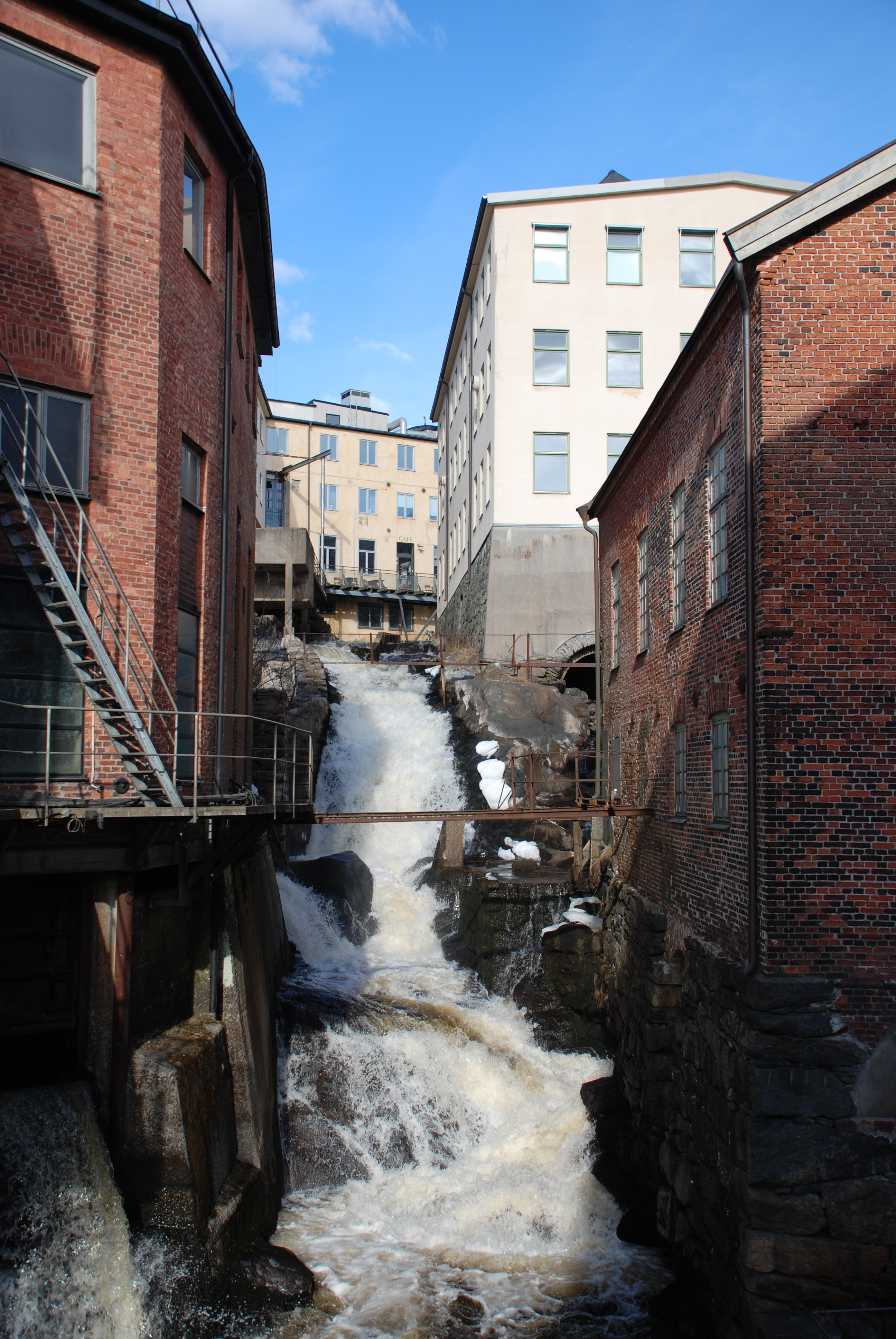 Forsens övre del vid Lilla Götafors i Mölndals Kvarnby.